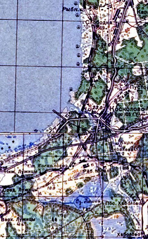 Карта Косколово в 1938 г.